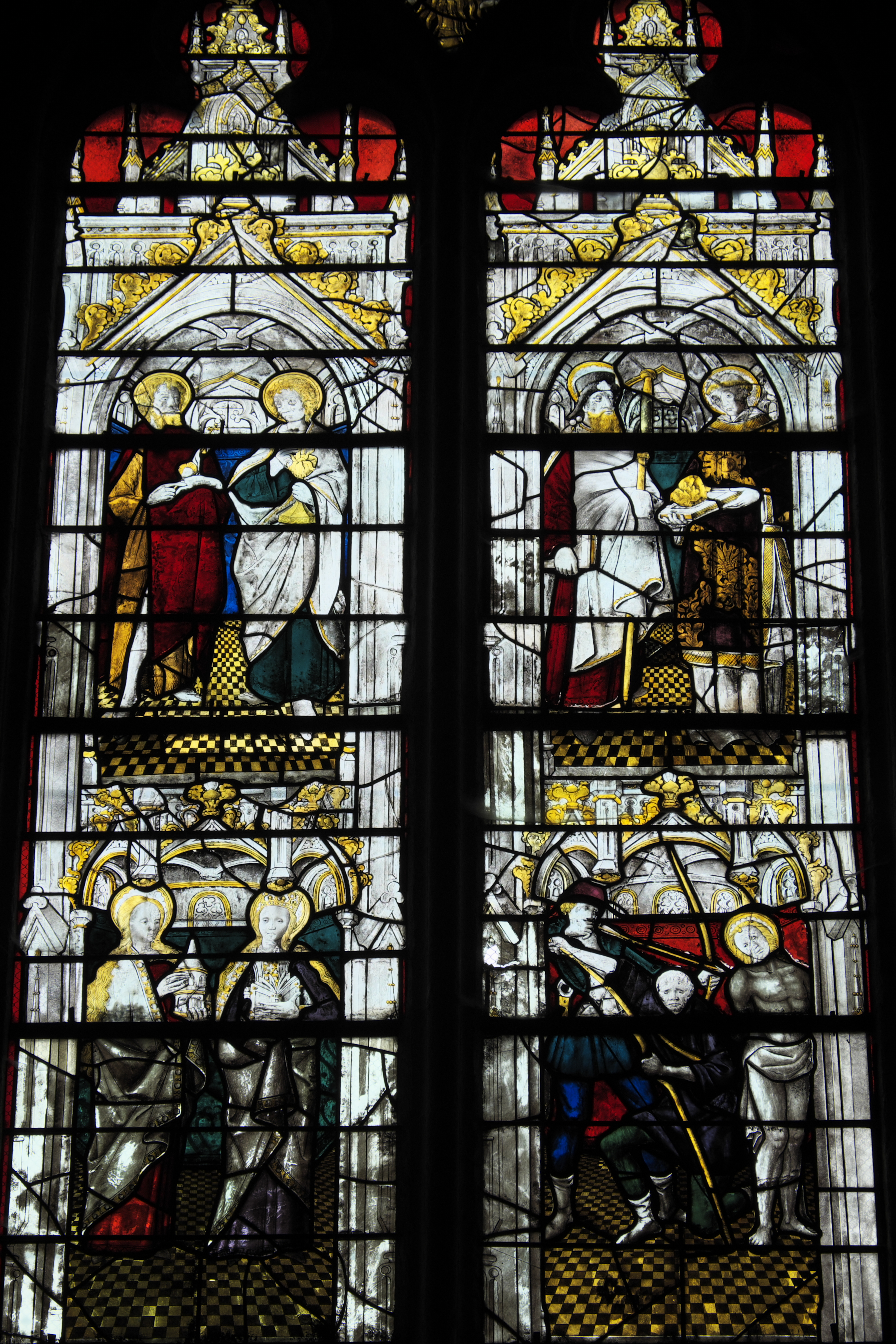 Saint-Étienne in Eymoutiers im Département Haute-Vienne (Nouvelle-Aquitaine/Frankreich), Bleiglasfenster (Nr. 12) aus dem 15. Jahrhundert; Darstellung: Maria Magdalena und heilige Katharina (unten links), heiliger Sebastian (unten rechts), Johannes der Täufer und Apostel Johannes (oben links), Jakobus der Ältere und heiliger Stephanus (oben rechts)